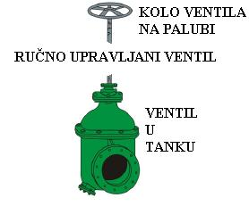 hand operated valve